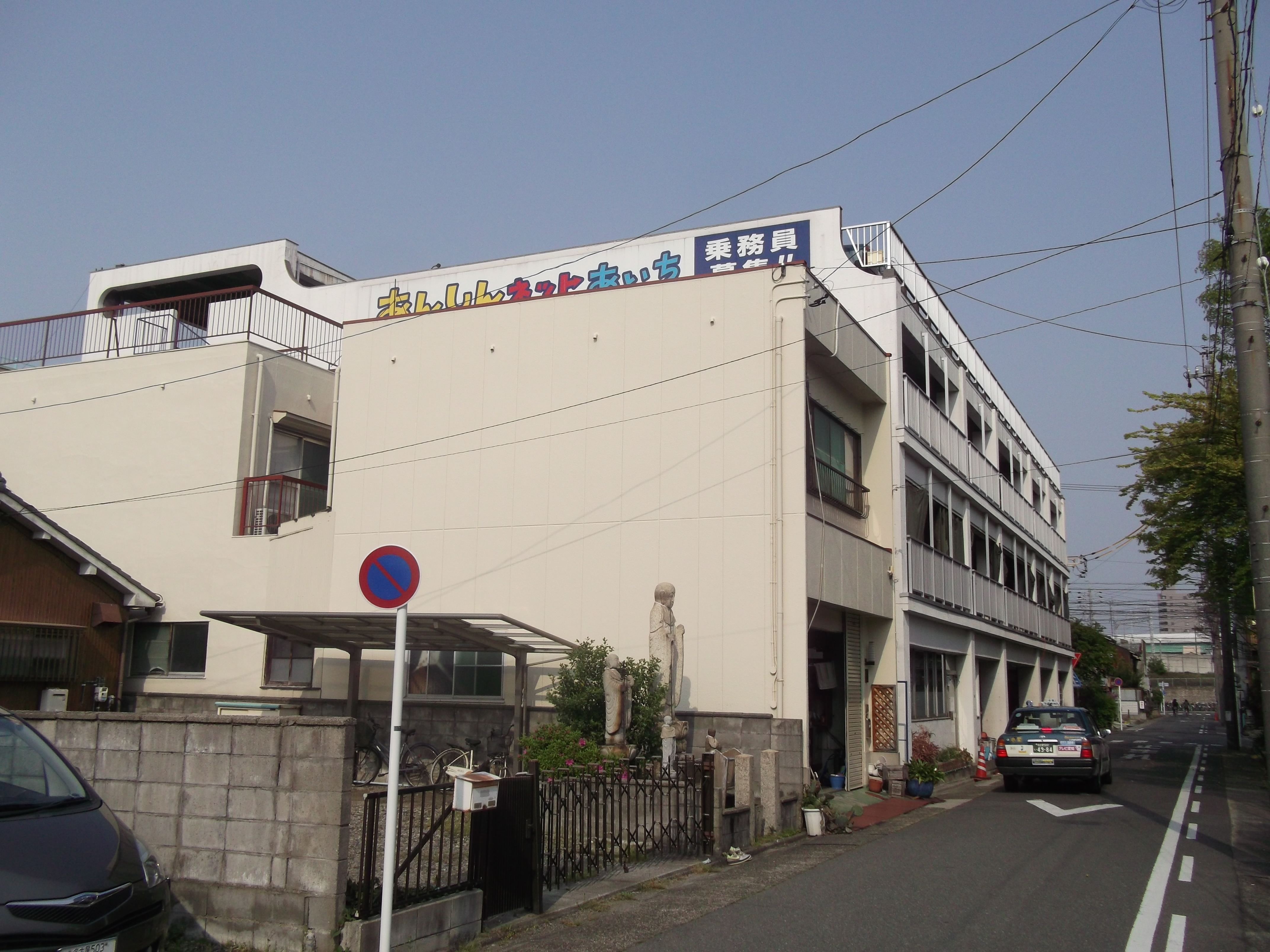 名古屋市中川区尾頭橋のあんしんネットあいち本社を南側公道西側より撮影